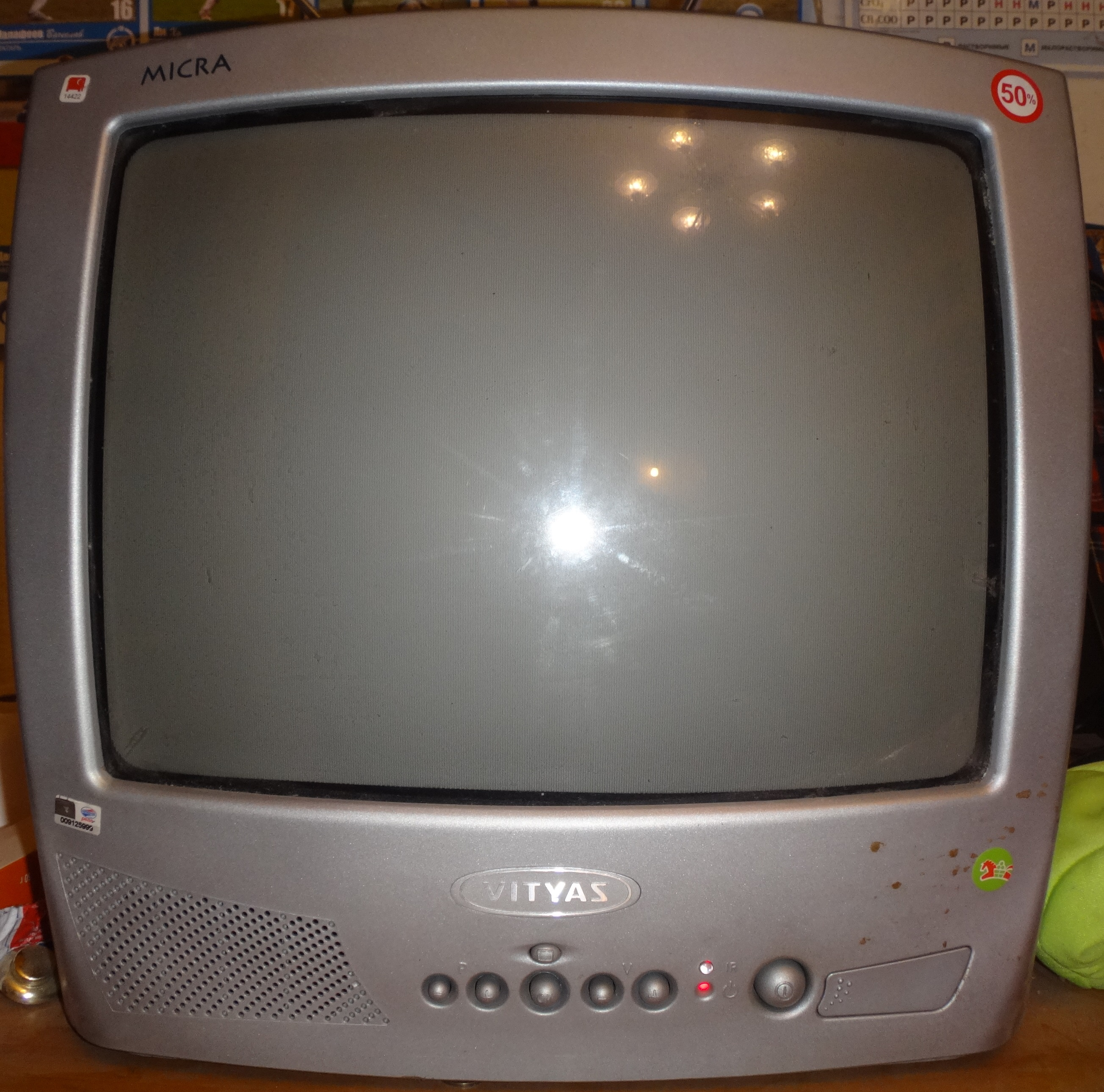 Телевизор "Витязь" модель "Микра"